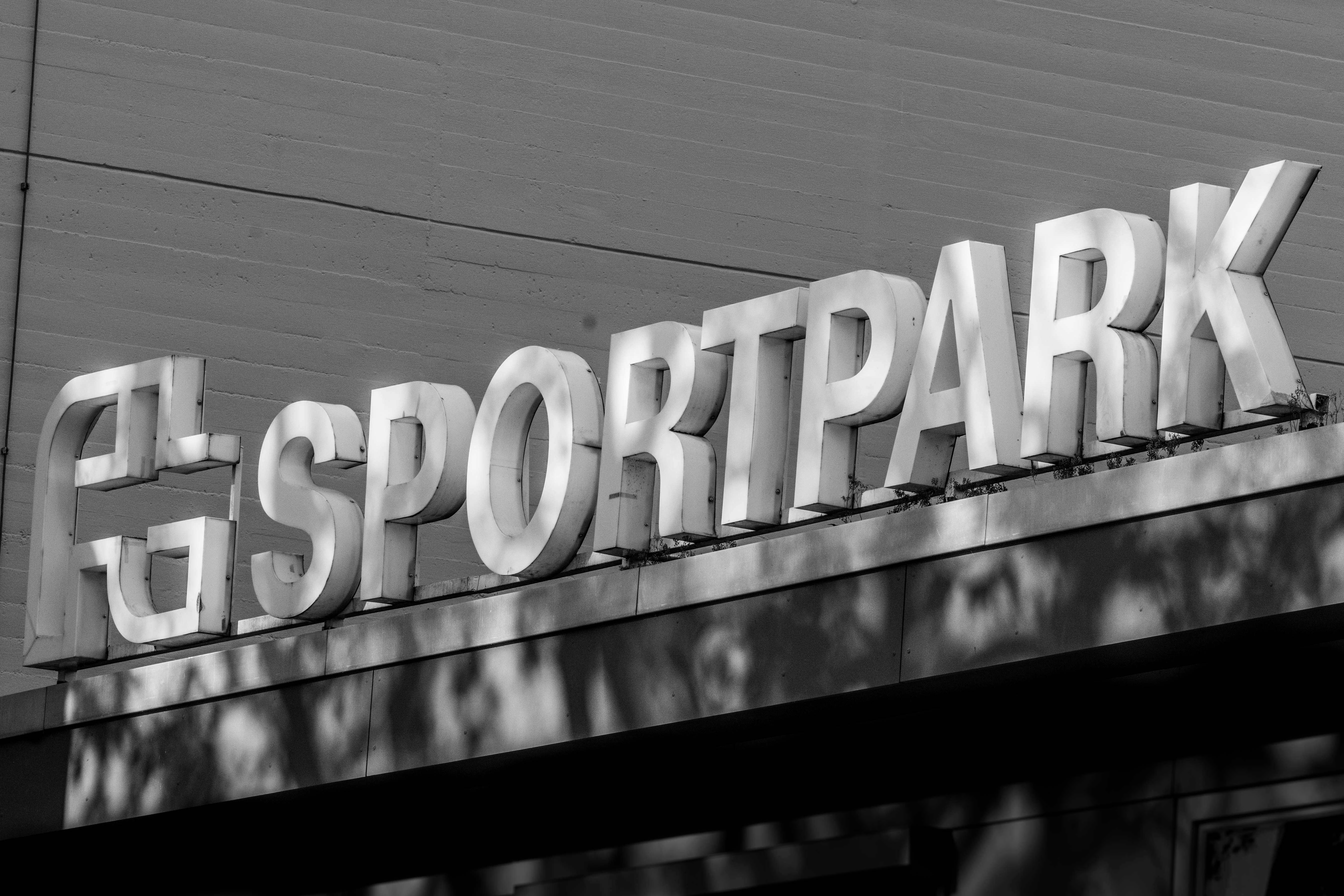 Im FT-Sportpark befinden sich verschiedenste Sporthallen und Außenanlagen.